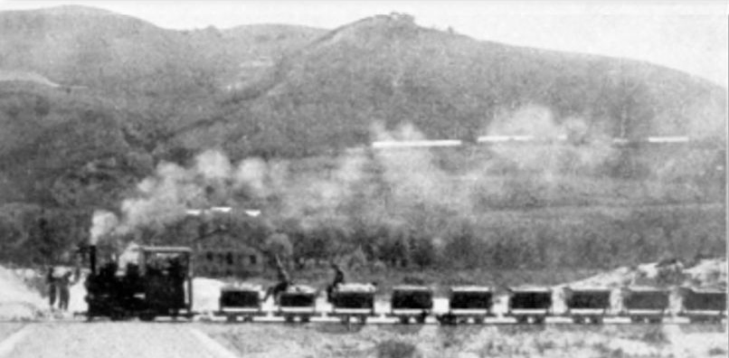 Albania - treno sulla ferrovia Decauville di Valona, 1915